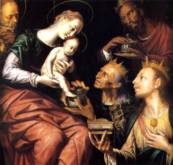 Museo. Tabla de la Adoración de los Reyes Magos, de Pedro de Campaña